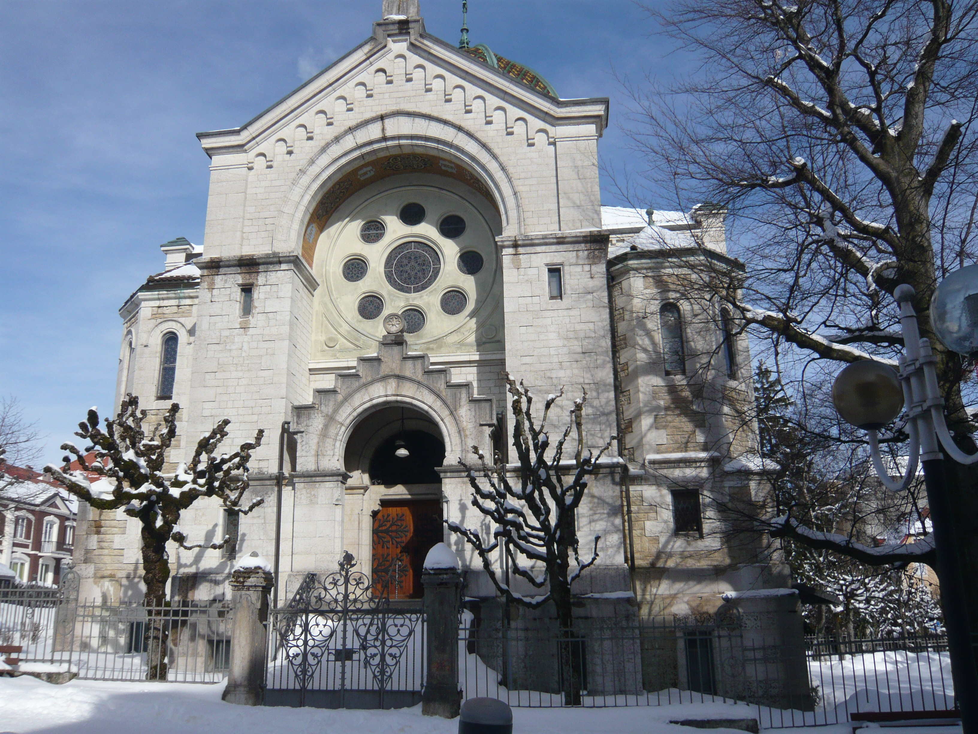 Vue de la façade de la synagogue de La Chaux-de-Fonds côté entrée